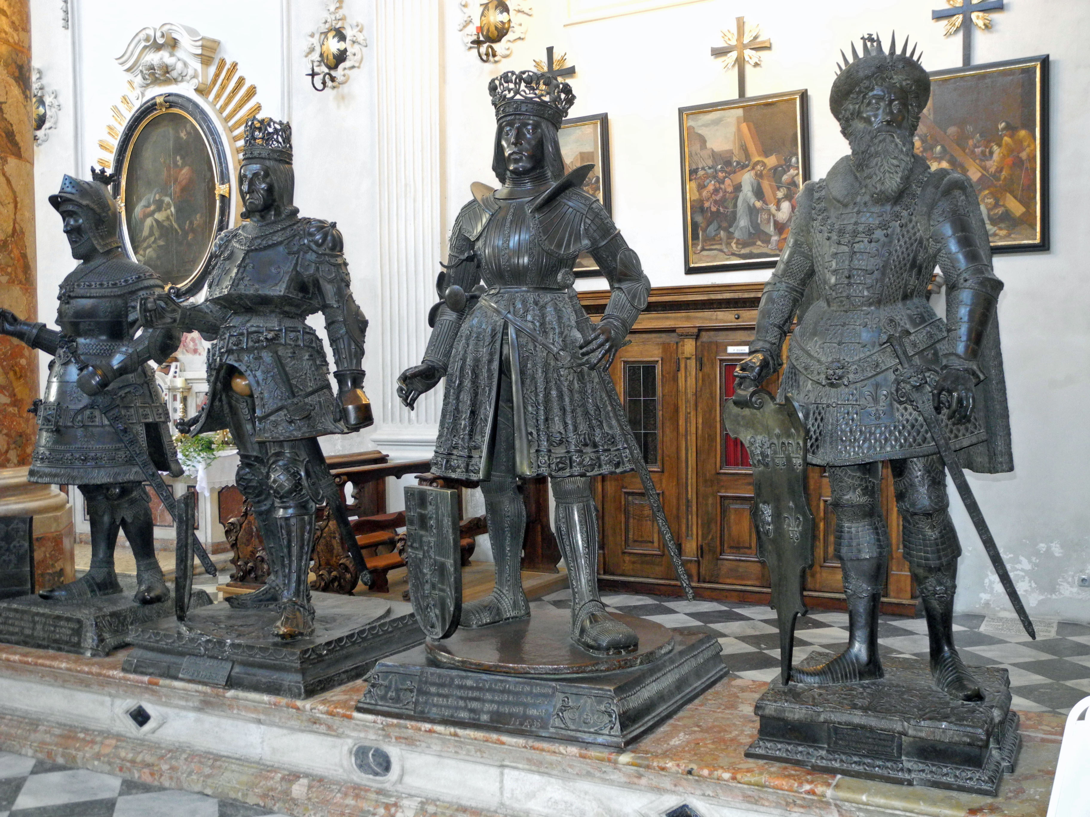 Hofkirche zum hl. Kreuz mit Grabmal Maximilians I. und Silberner Kapelle